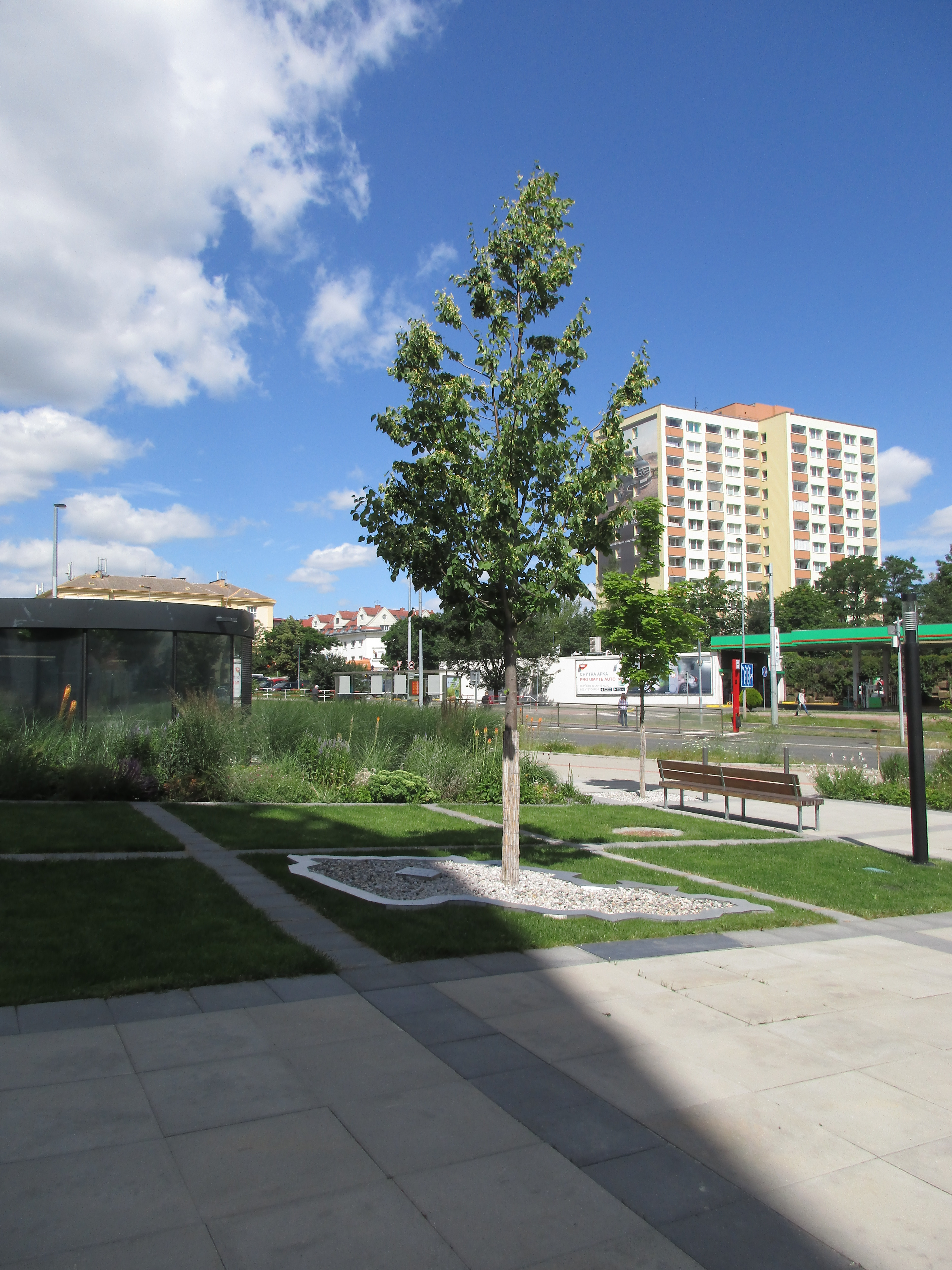 Lípa republiky. Praha 6 - Veleslavín, zastávka MHD Nádraží Veleslavín. Vysazena 14. září 2018 na památku 100. výročí vzniku Československé republiky.